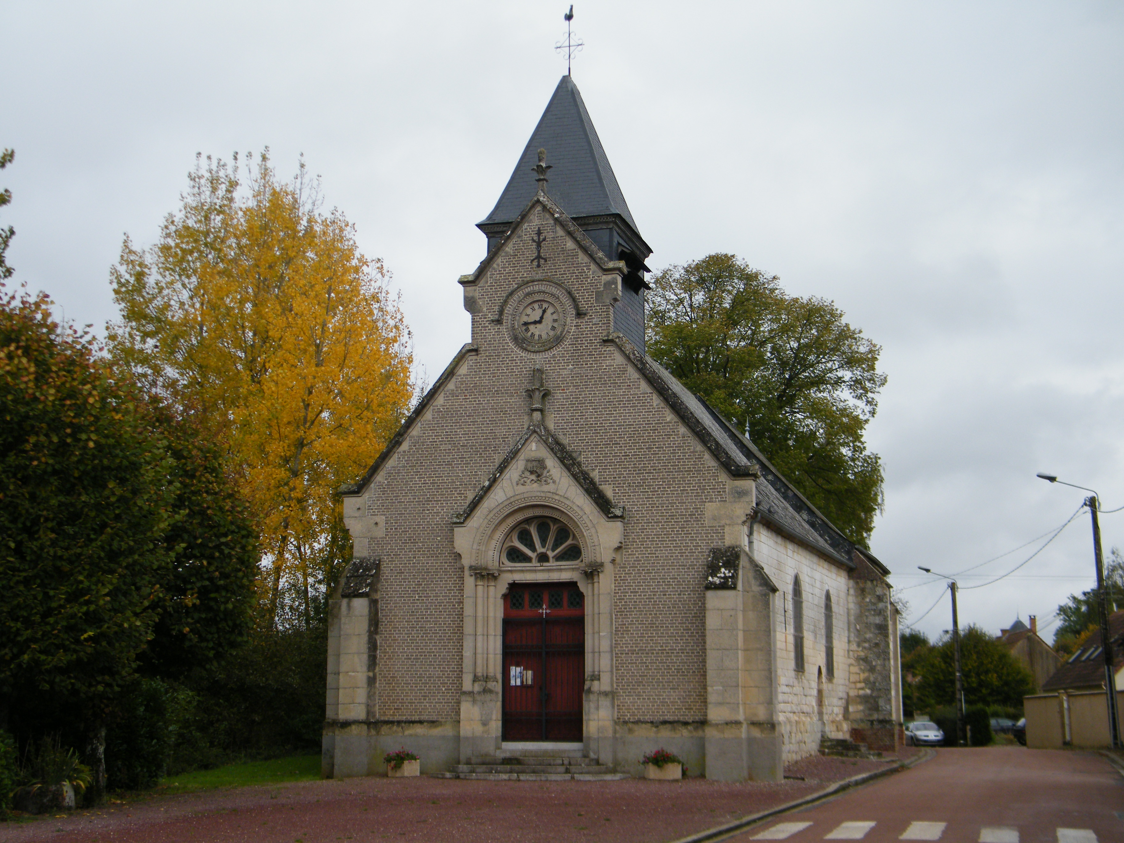 église.